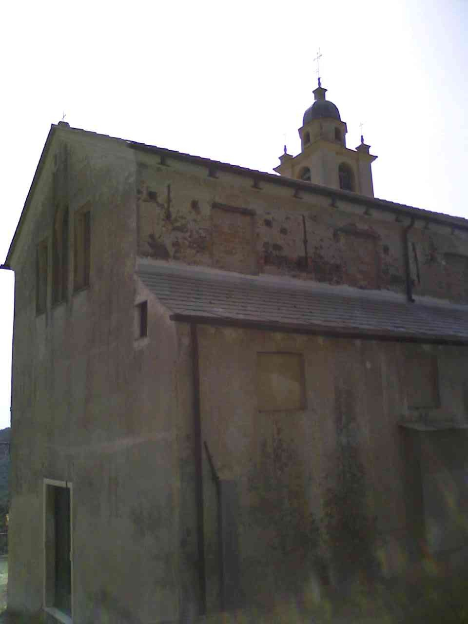 Chiesa parrocchiale di Gameragna (SV-Italy)